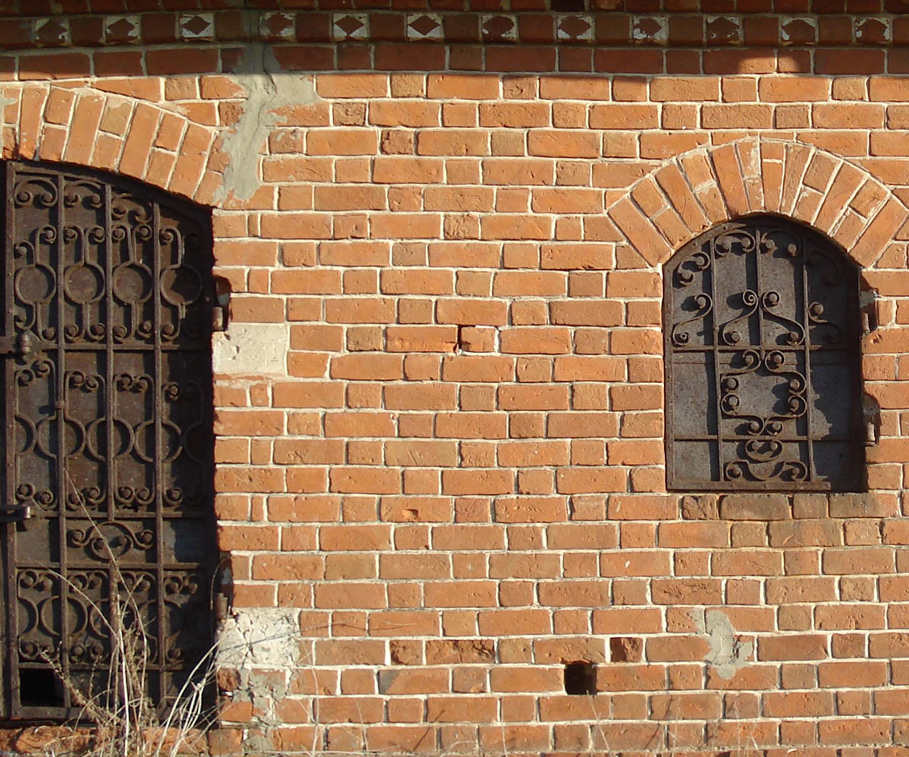 Фрагменты амбара. Яковцево Вачский р-н Нижегородской обл.